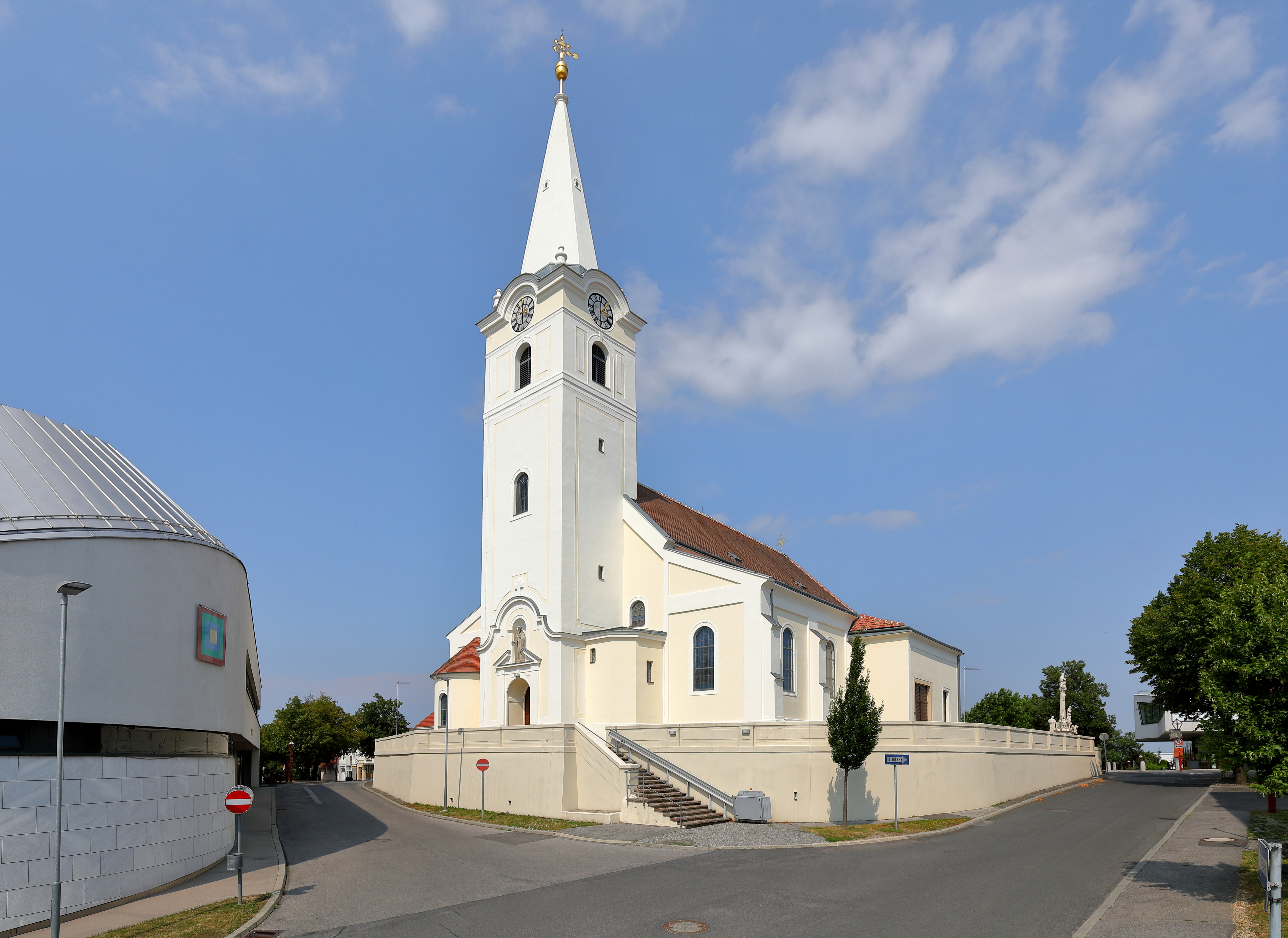 Südwestansicht der röm.-kath. Pfarrkirche „Zur Kreuzerhöhung“ in der burgenländischen Marktgemeinde Deutschkreutz.Um 1670 wurde eine einschiffige, spätbarocke Saalkirche unter einem Tonnengewölbe anstelle einer Vorgängerkirche errichtet. Zu jener Zeit war auch noch der Friedhof um die Kirche herum. 1928 wurde die Kirche durch zwei Seitenschiffe erweitert und die Kirchhofmauer erneuert. In den Jahren 1973/74 kam es unter der Federführung von Prof. Anton Lehmden zu größeren Umbau- und Renovierungsarbeiten. Unter anderem erfolgte nordseitig ein Anbau mit einem hohem Rundgiebel.